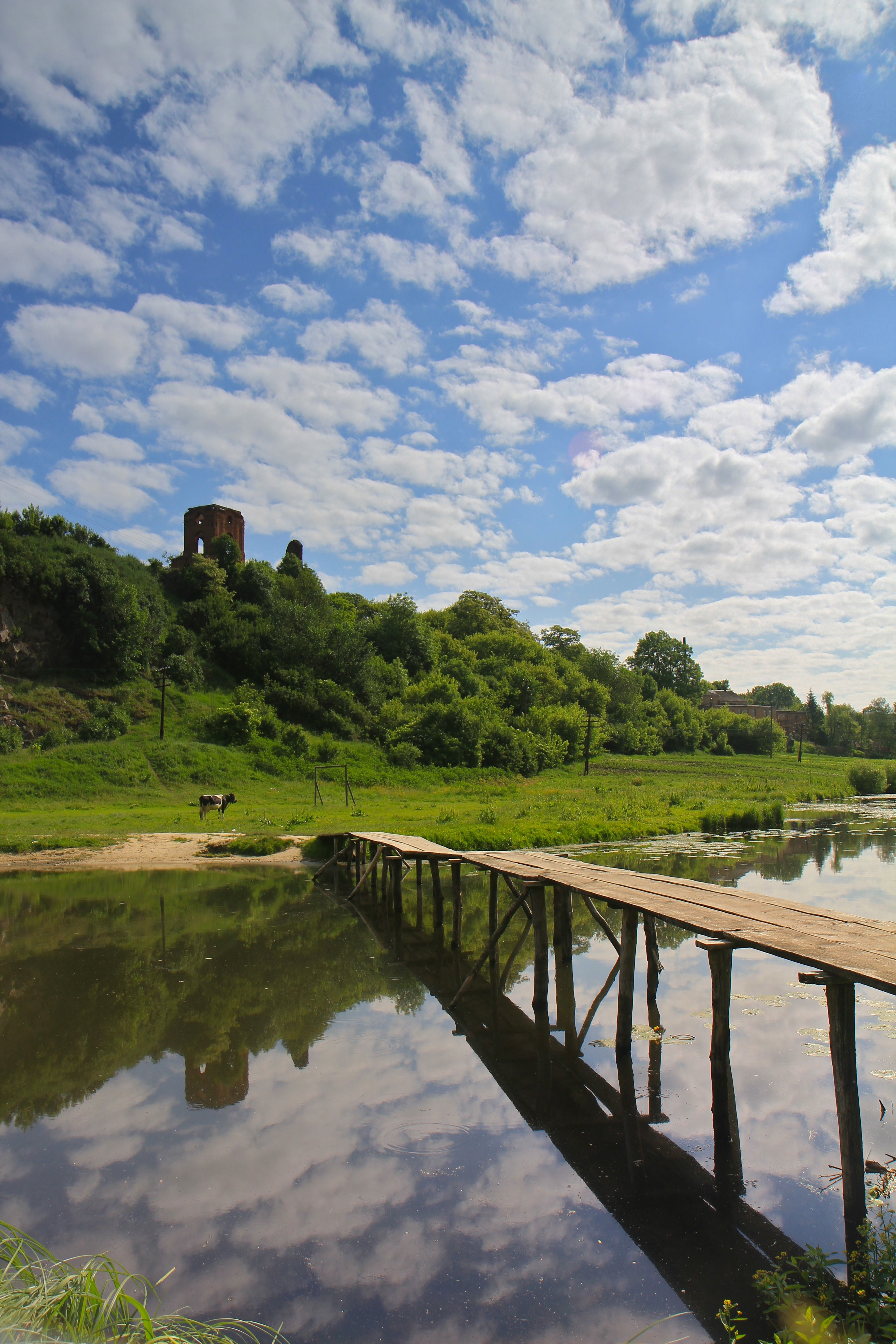 Корець